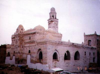 العامرية او المنصورية مسجد ومدرسة في مدينة الملوك مديرية جبن الضالع وسط اليمن بناها الملك المنصور عبد الوهاب بن داود احد ملوك اليمن في عهد الدولة الطاهرية وقد توفى في بلده جبن في 894 هجري